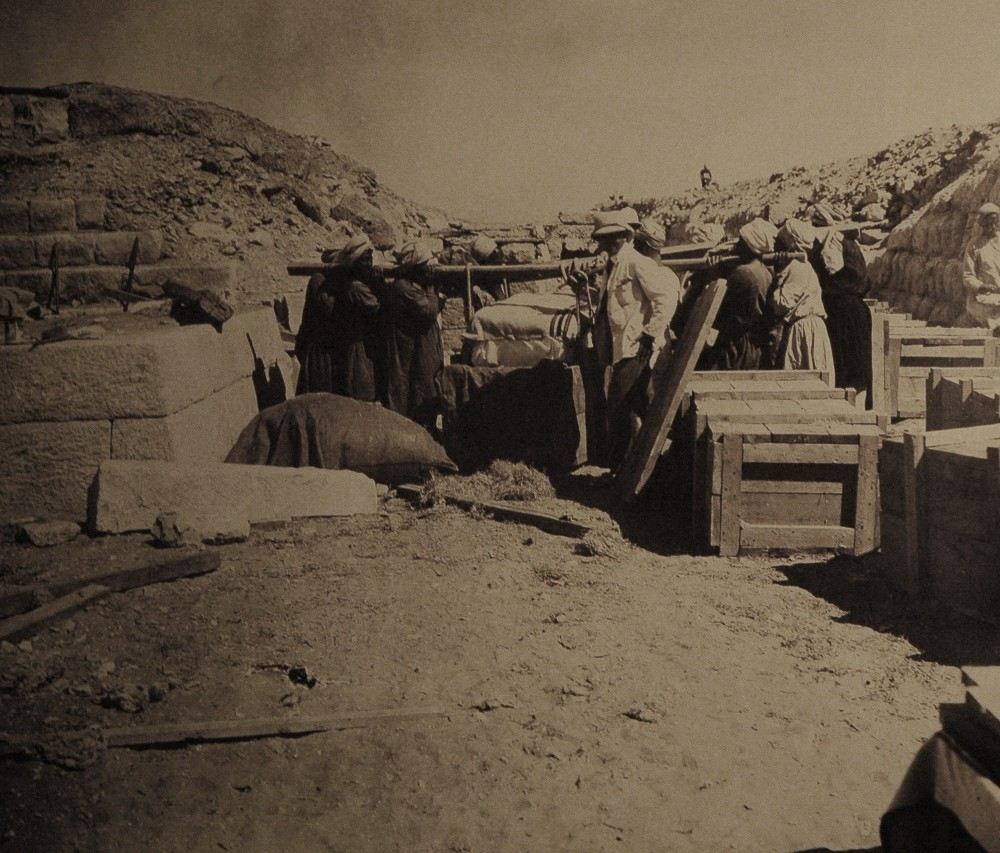 Abbau der Kultkammer des Ka-ni-nisut, Giza, Westfriedhof, Grabung Hermann Junker